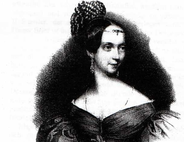 Ein Gemälde der deutschen Pianistin und Komponistin Delphine von Schauroth (1813–1887) von Wilhelm Hensel (1794–1861), um 1839